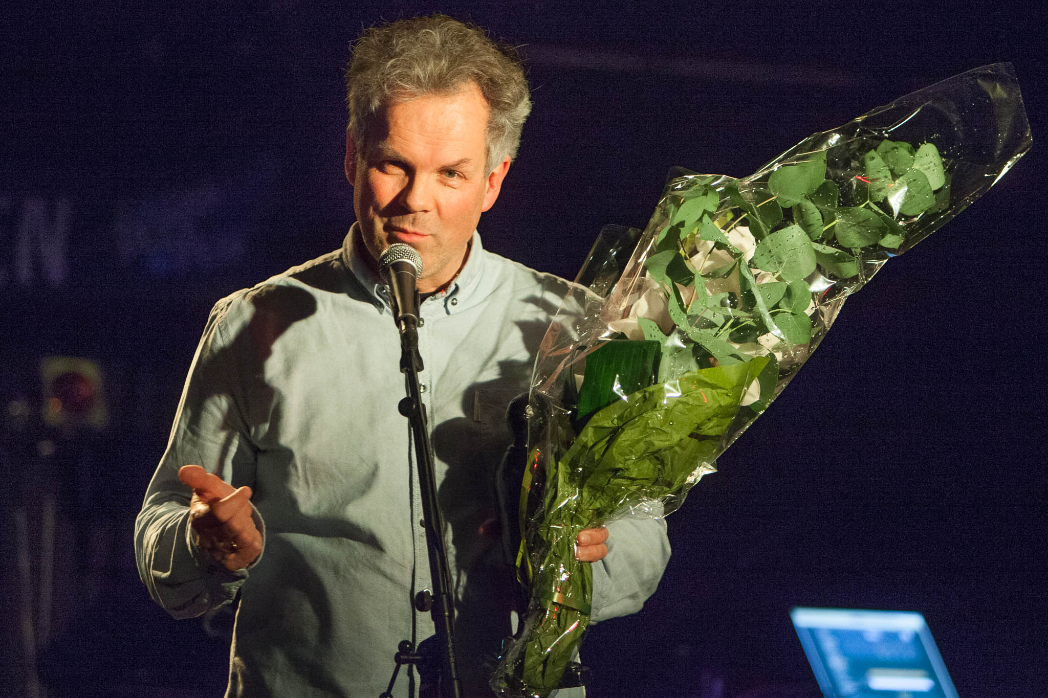 Jan Gunnar Hoff mottok Buddy-prisen fra Norsk Jazzforum under Bodø Jazz Open 2014